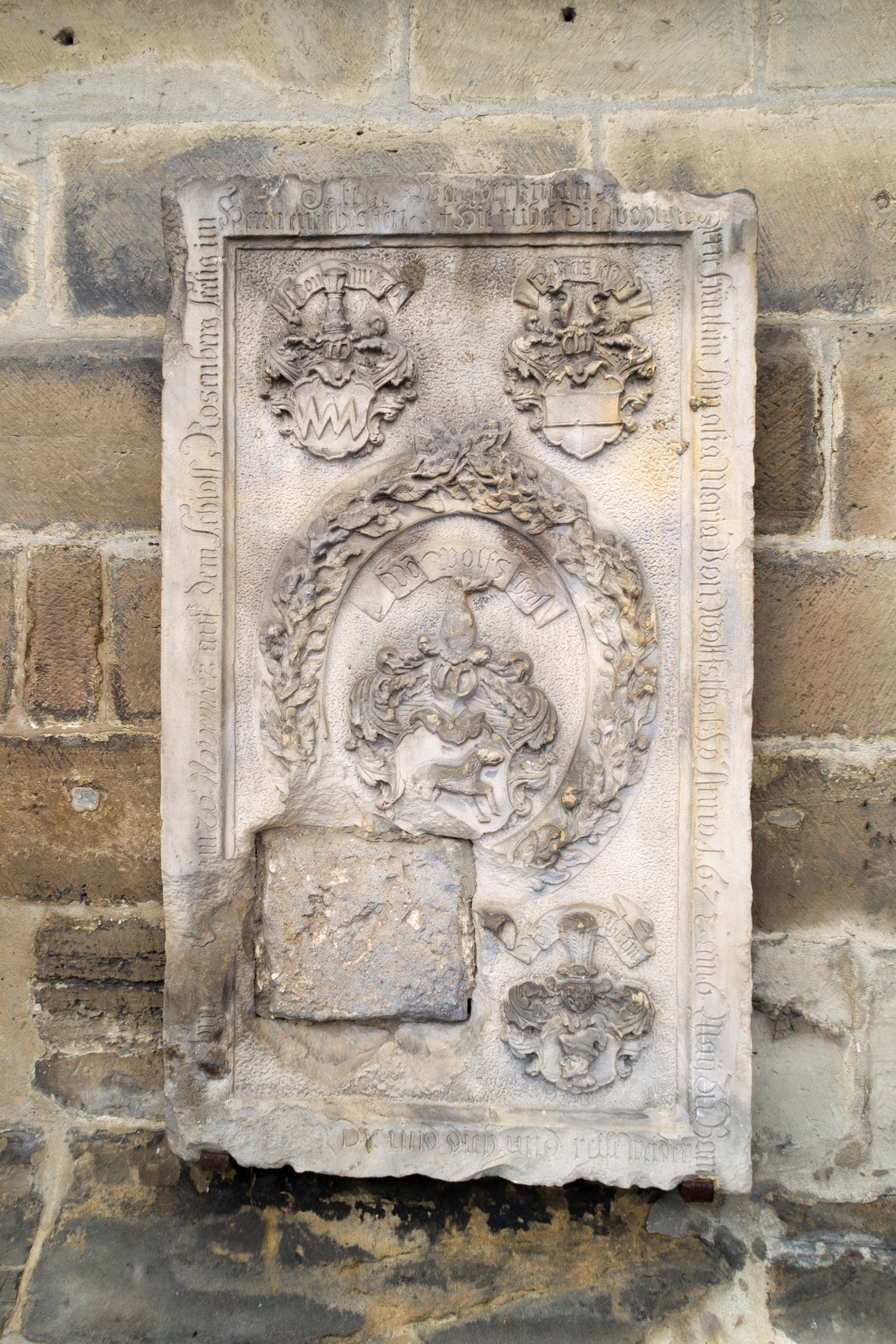 Grabplatte der Amalia Maria von Wolfsthal († 1688) an der Ostseite des Chores der katholischen Stadtpfarrkirche St. Johannes der Täufer in Kronach. Mitte: Wappen Wolf von Wolfsthal. Ahnenwappen: Murach, Pfersfeld, Würtzburg